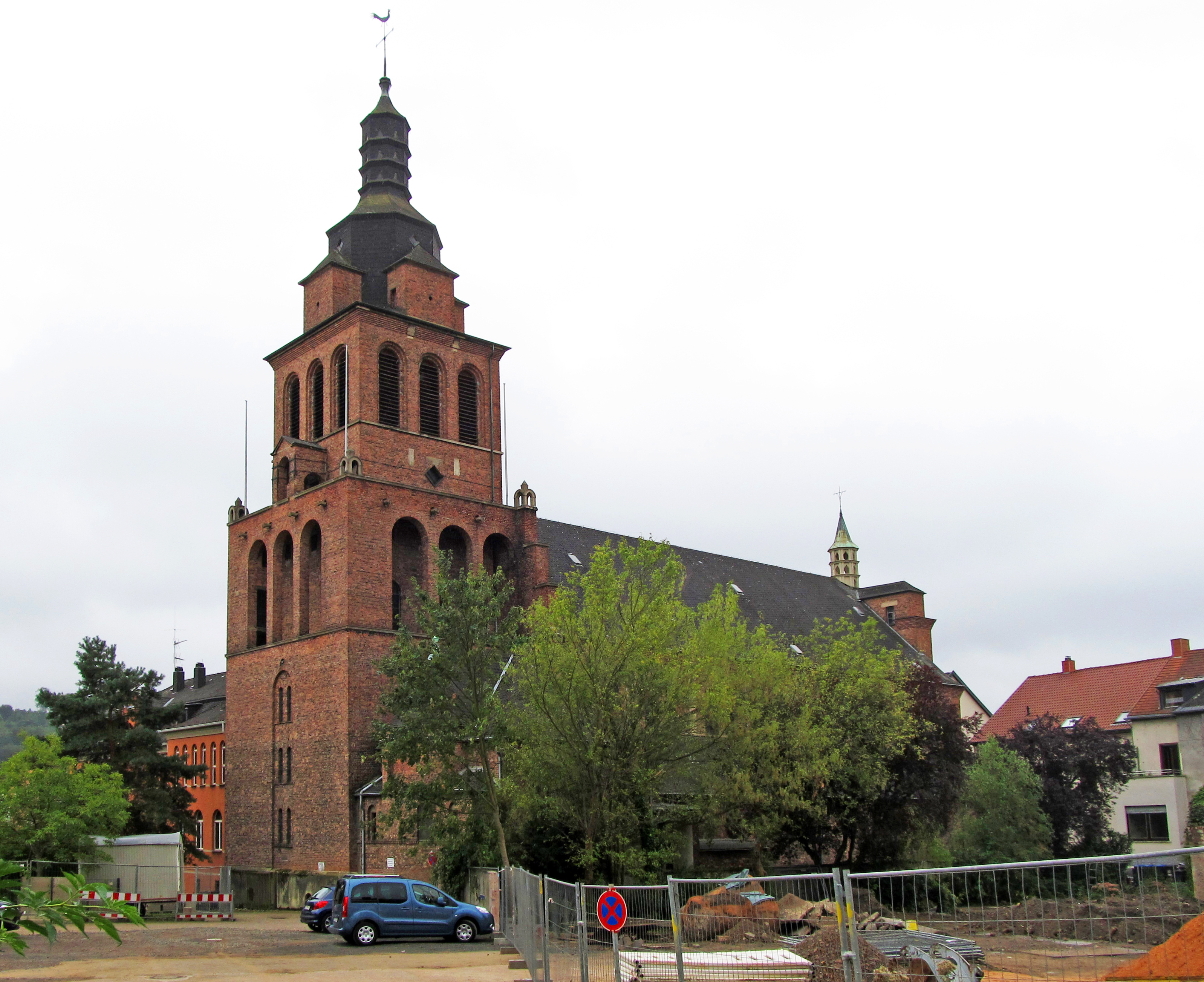 Die katholische Pfarrkirche Allerheiligen in Sulzbach, Saarland